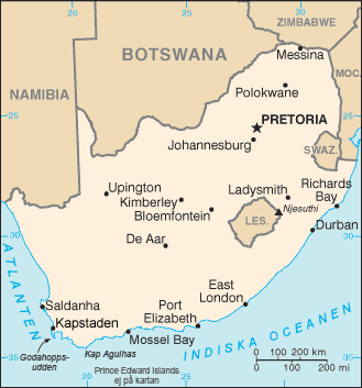 Sydafrika.